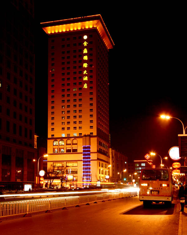 牡丹江市太平路的金鼎國際大酒店